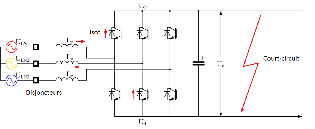 Illustration de la circulation du courant de court circuit dans un VSC.